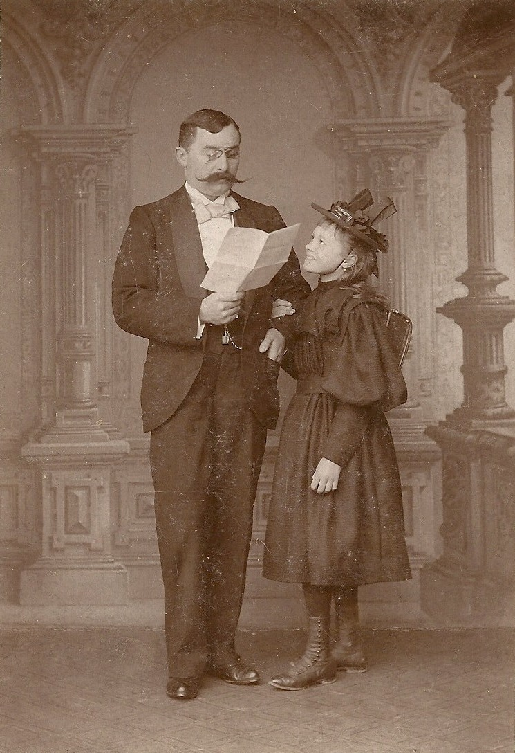 Unkel, Vater Ernst Profitlich mit Tochter Ada und Zeugnis 1894.